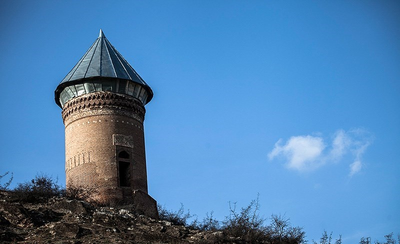 مازِرونی: رسکت برج که ساری ِجنوبی مله ئون دله دره.